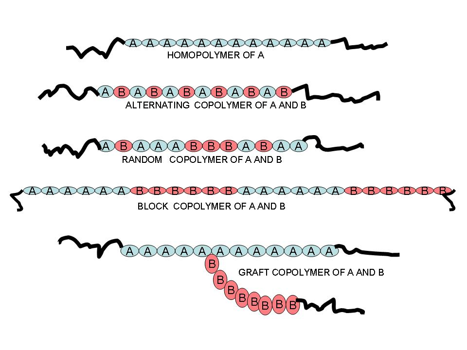 Common Polymer Architectures